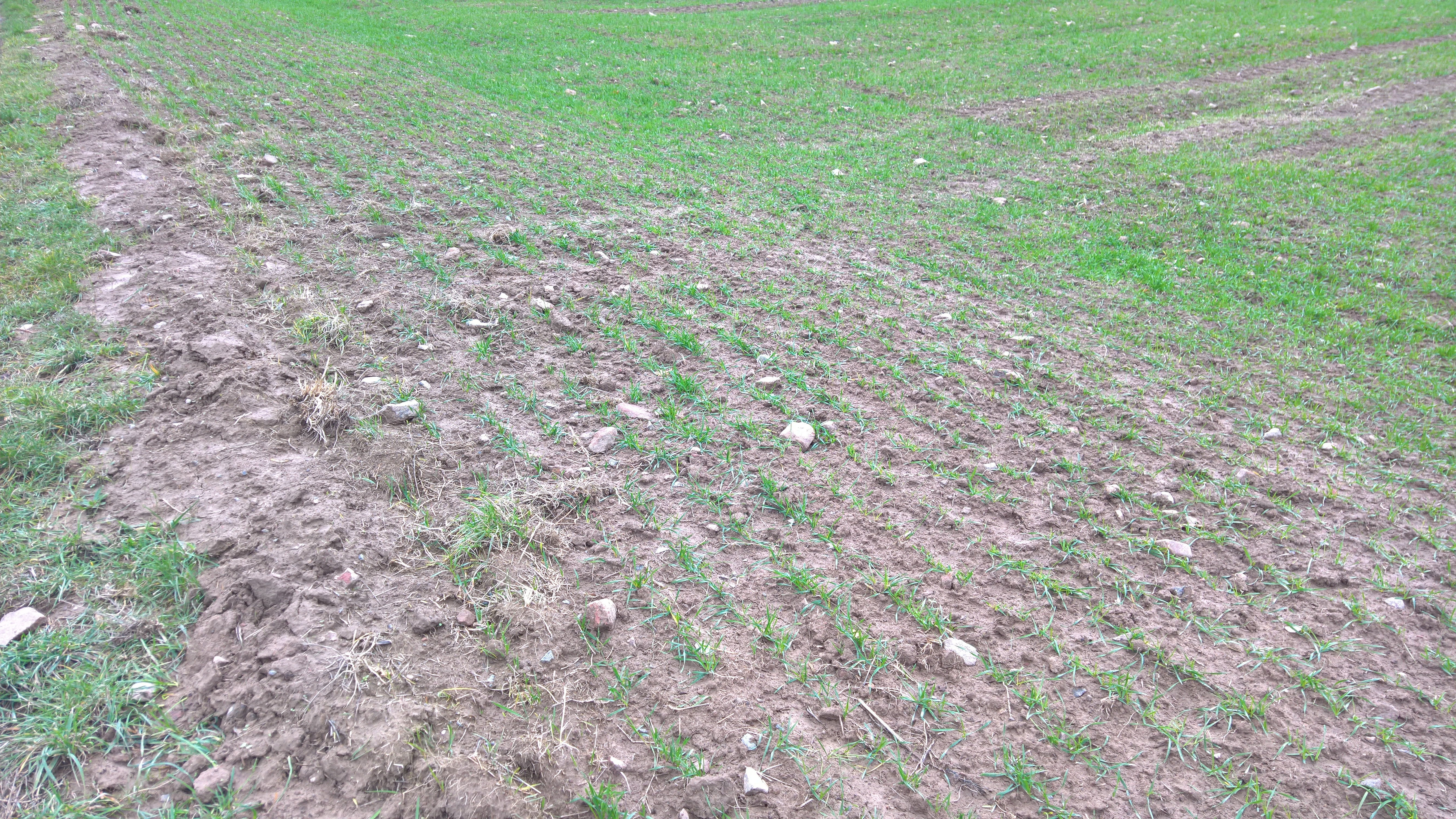 Sandsteinreste an der Lage des Wp 10/5